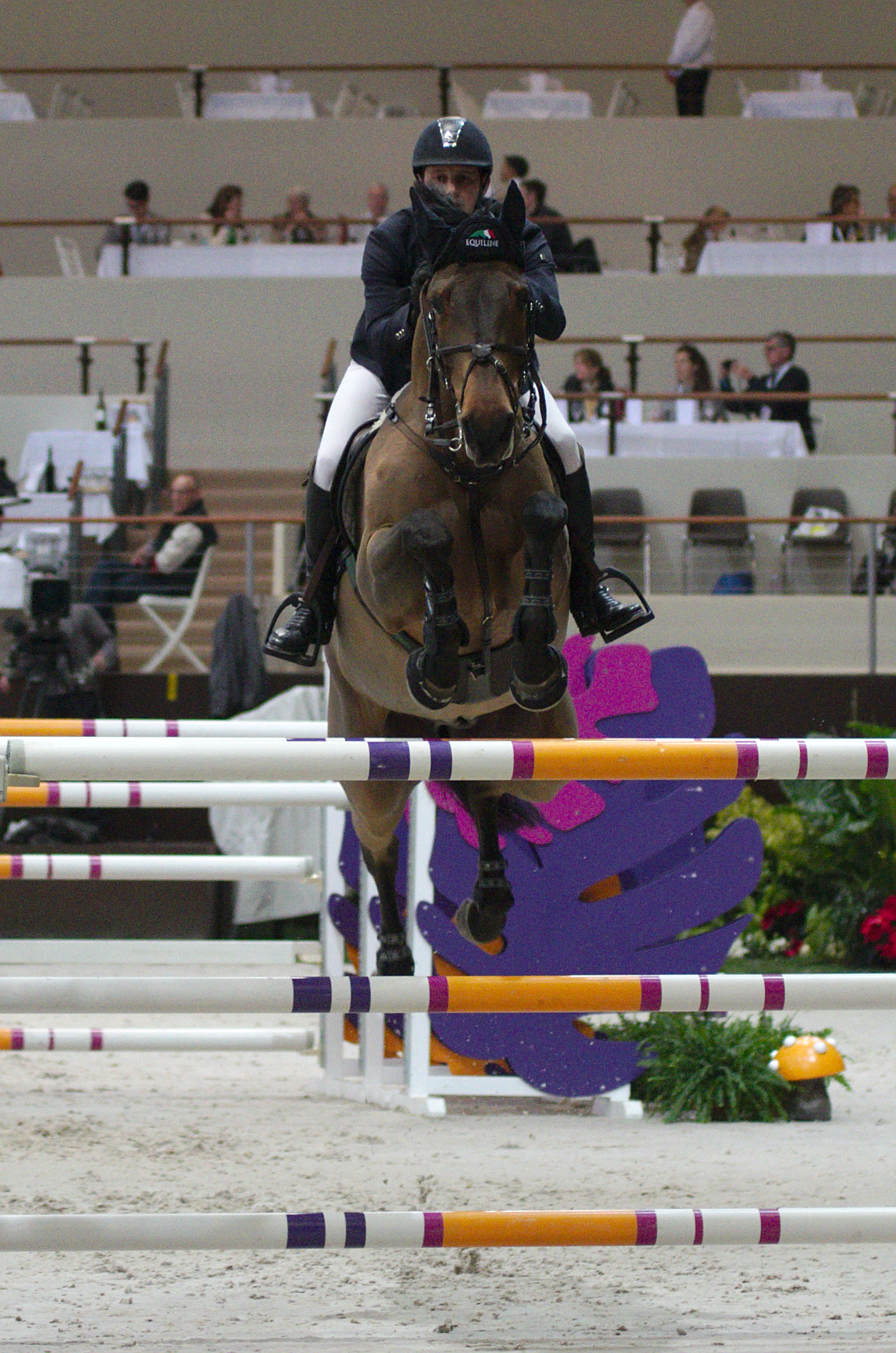 54eme CHI de Genève - 20141213 - Coupe de Genève - Billy Twomey et Diaghilev